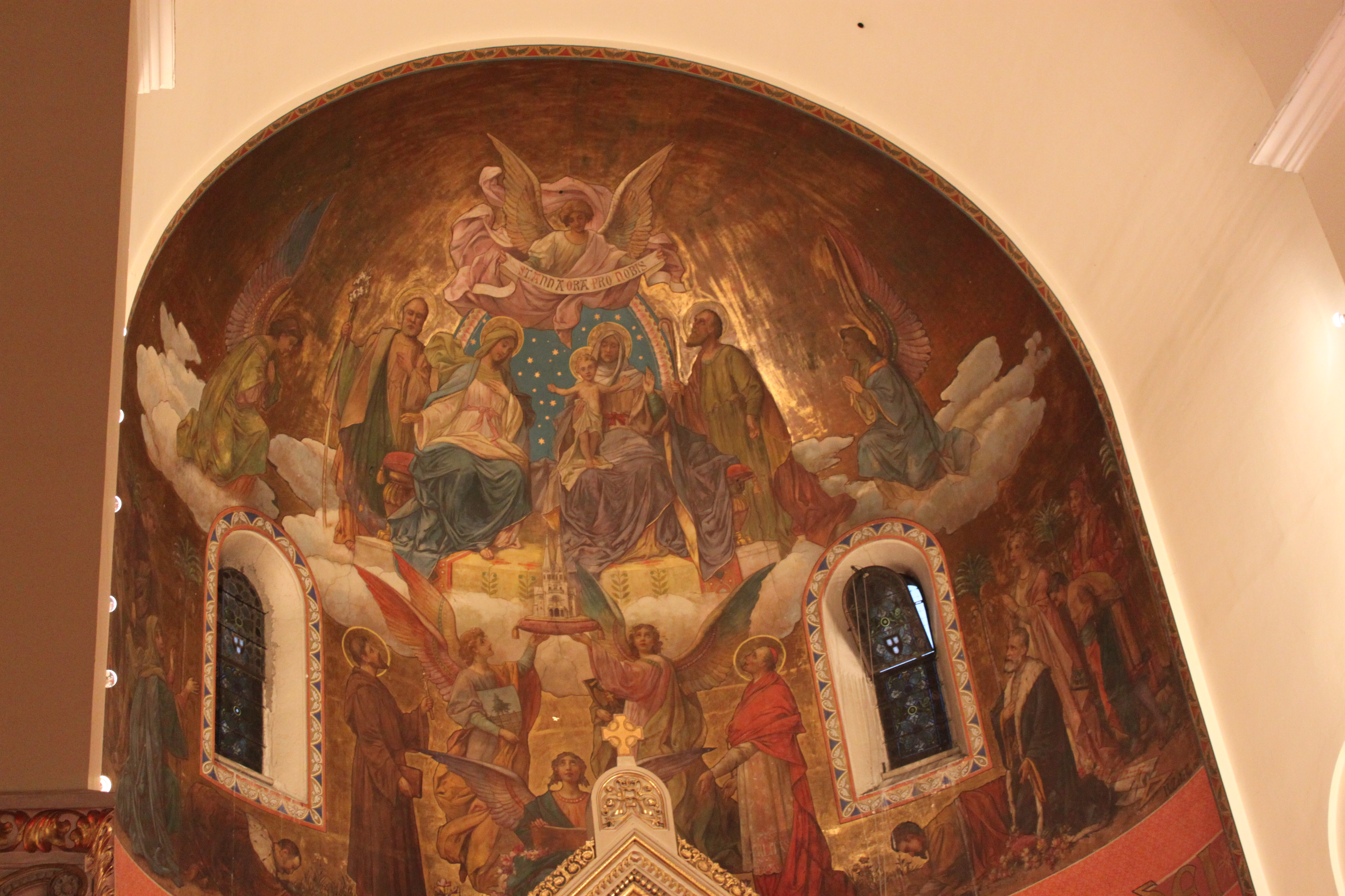 Von Hans Zatzka geschaffene Wandmalereien in der Apsis der Pfarrkirche St. Anna-Baumgarten, Wien 14